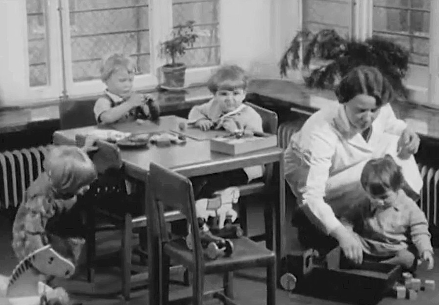 Kvarteret Färjan, barnkrubban